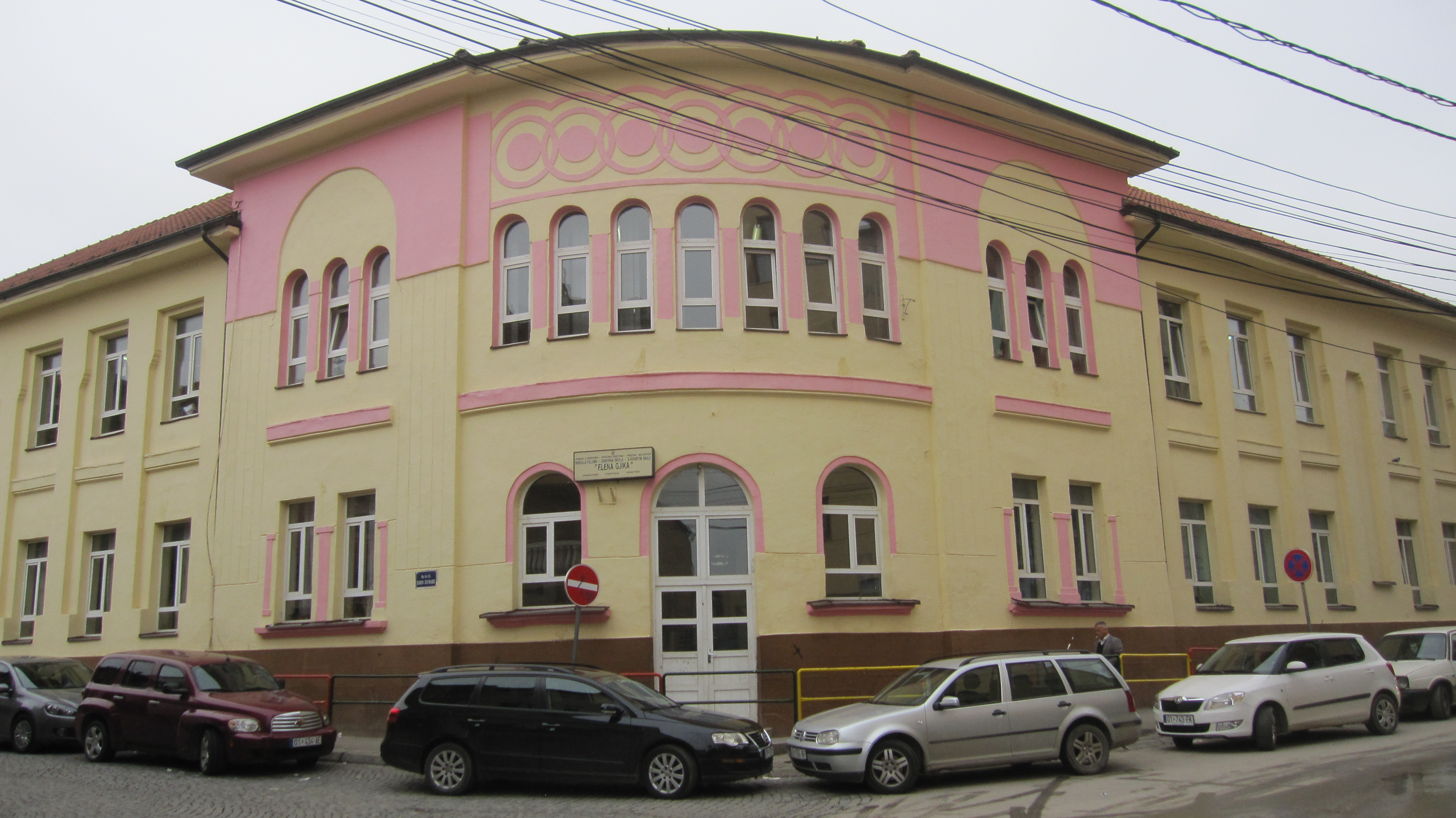 Shkol.Fill. “Elena Gjika”.